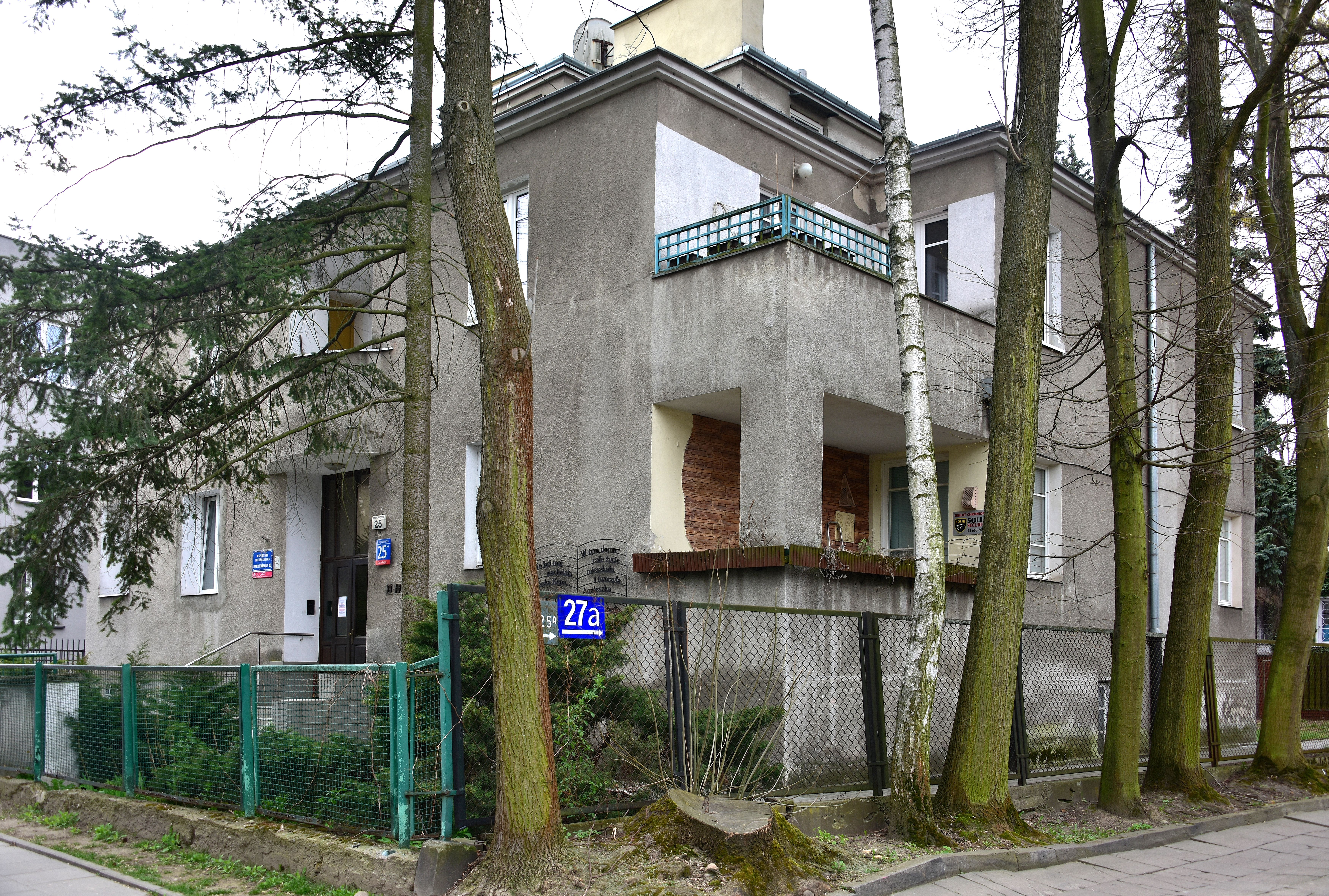 Willa przy ul. Dąbrowieckiej 25 na Saskiej Kępie w Warszawie